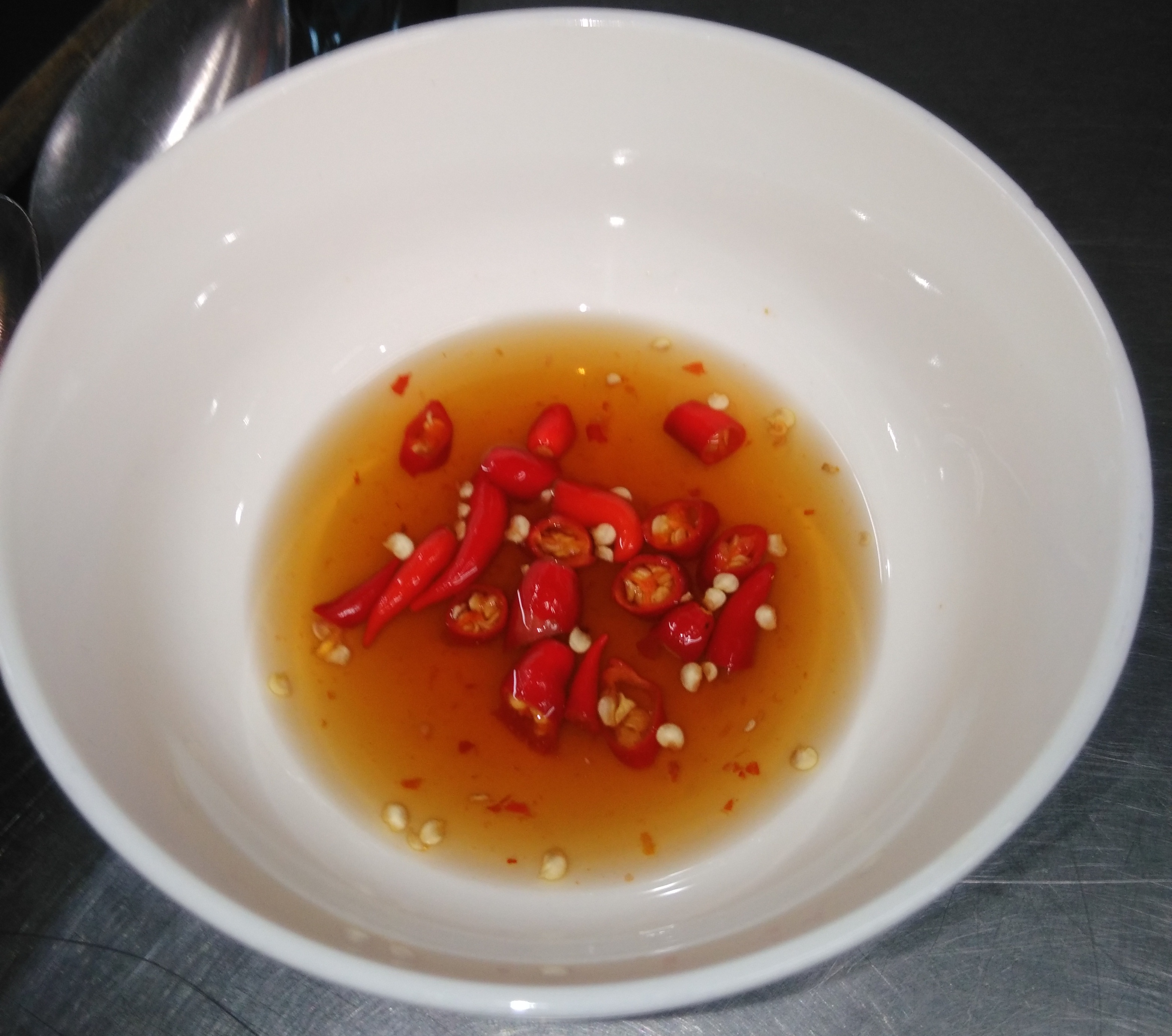 Nước mắm ớt tại BigC Phú Thạnh ngày 24-7-2016